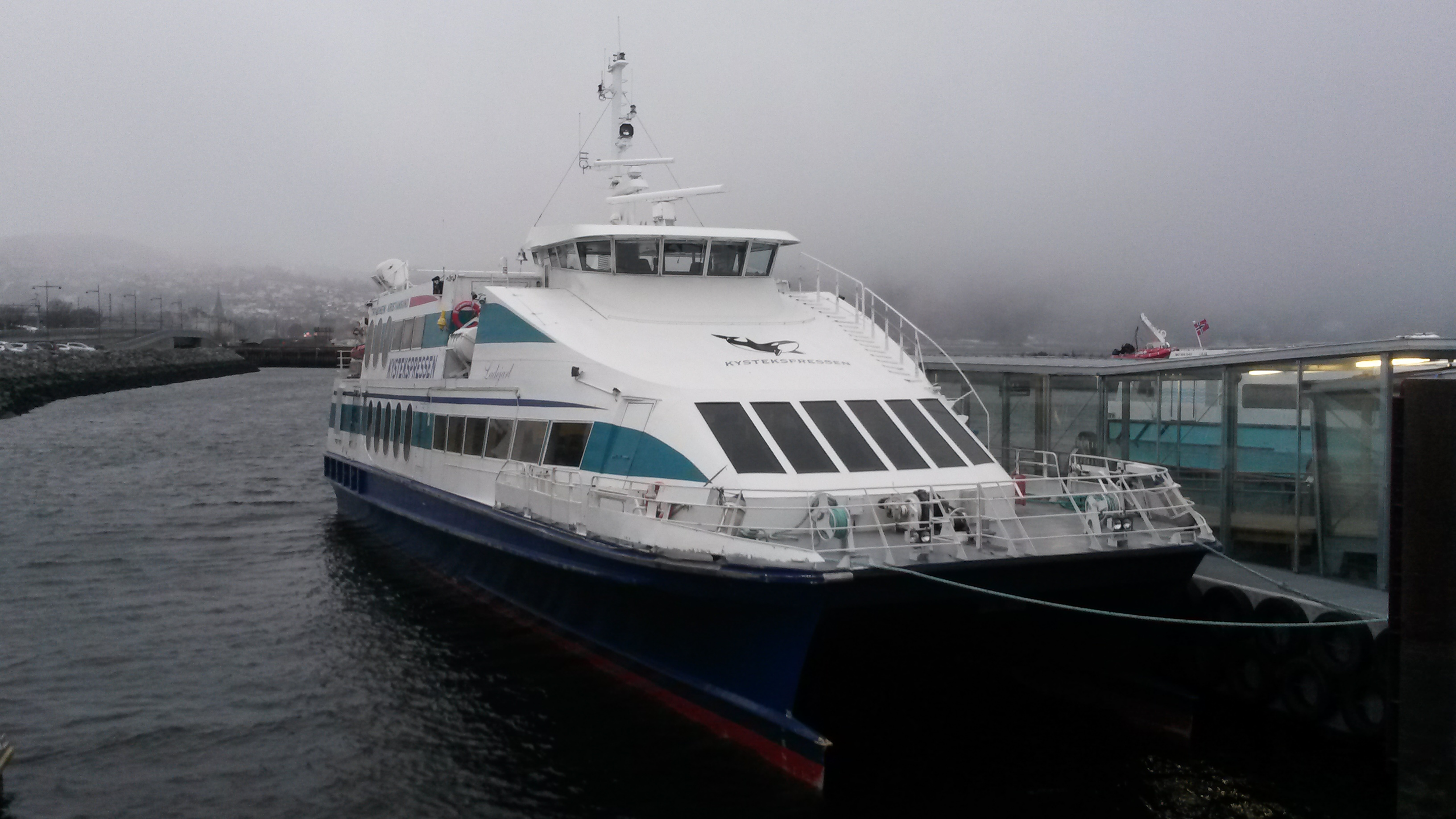 MS Ladejarl i Trondheim.